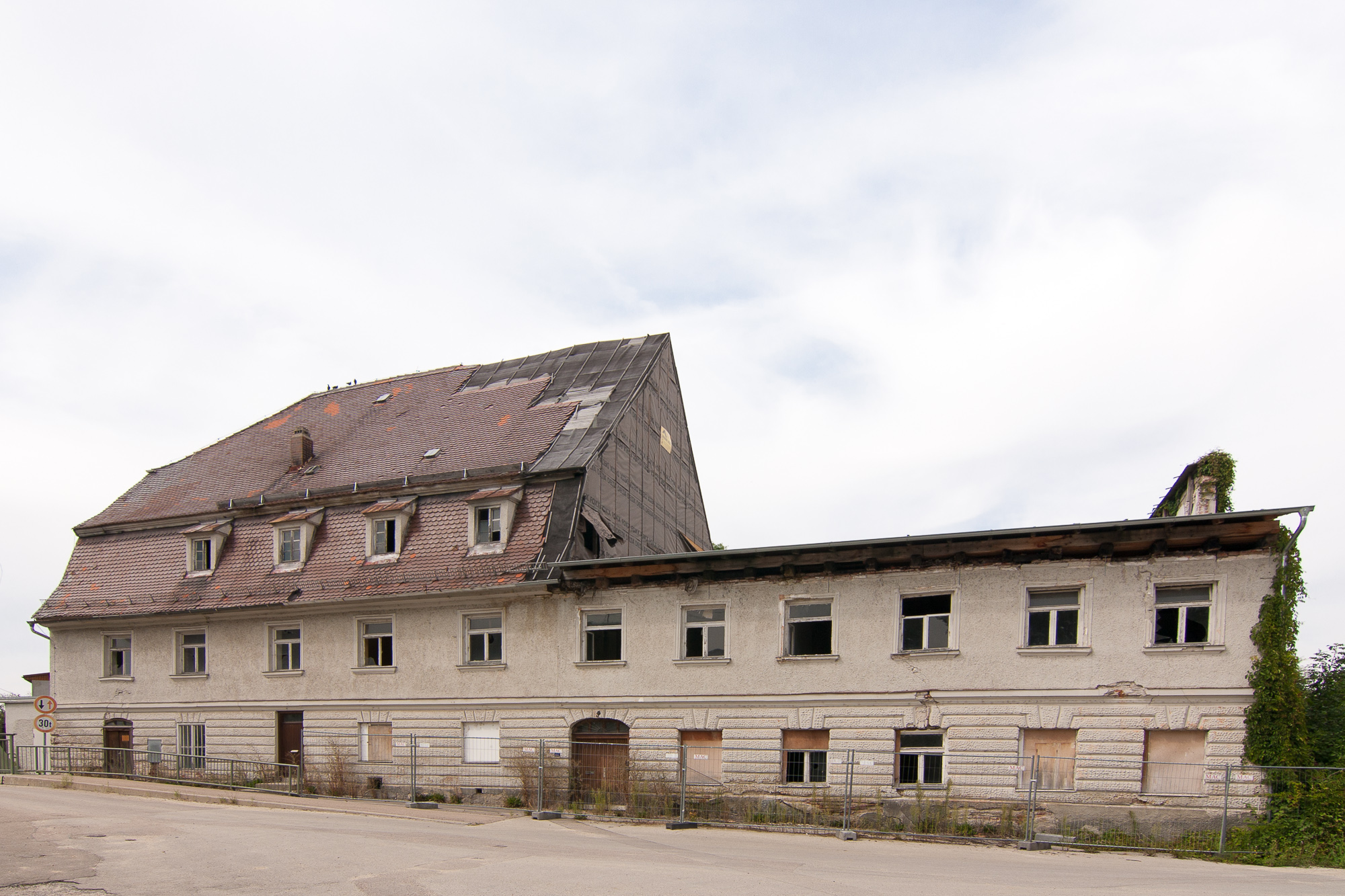 Ehem. Papier-, später Roggenmühlengebäude, zweigeschossiger gegliederter Putzbau mit Mansardgiebeldach, im nachbarocken Stil, nach 1800This is a photograph of an architectural monument.